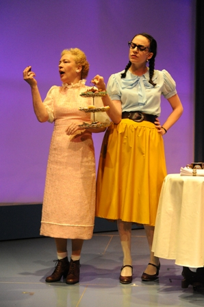 רבקה נוימן ונטע שפיגלמן הצגת הארבי 2012 – צלם גדי דגון